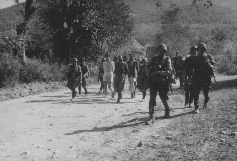 Srpskohrvatski / српскохрватски: Nemci odvode narod na streljanje, Kragujevac 1941.